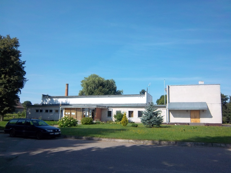 Rumšiškių kultūros centras, Dovainonių skyrius